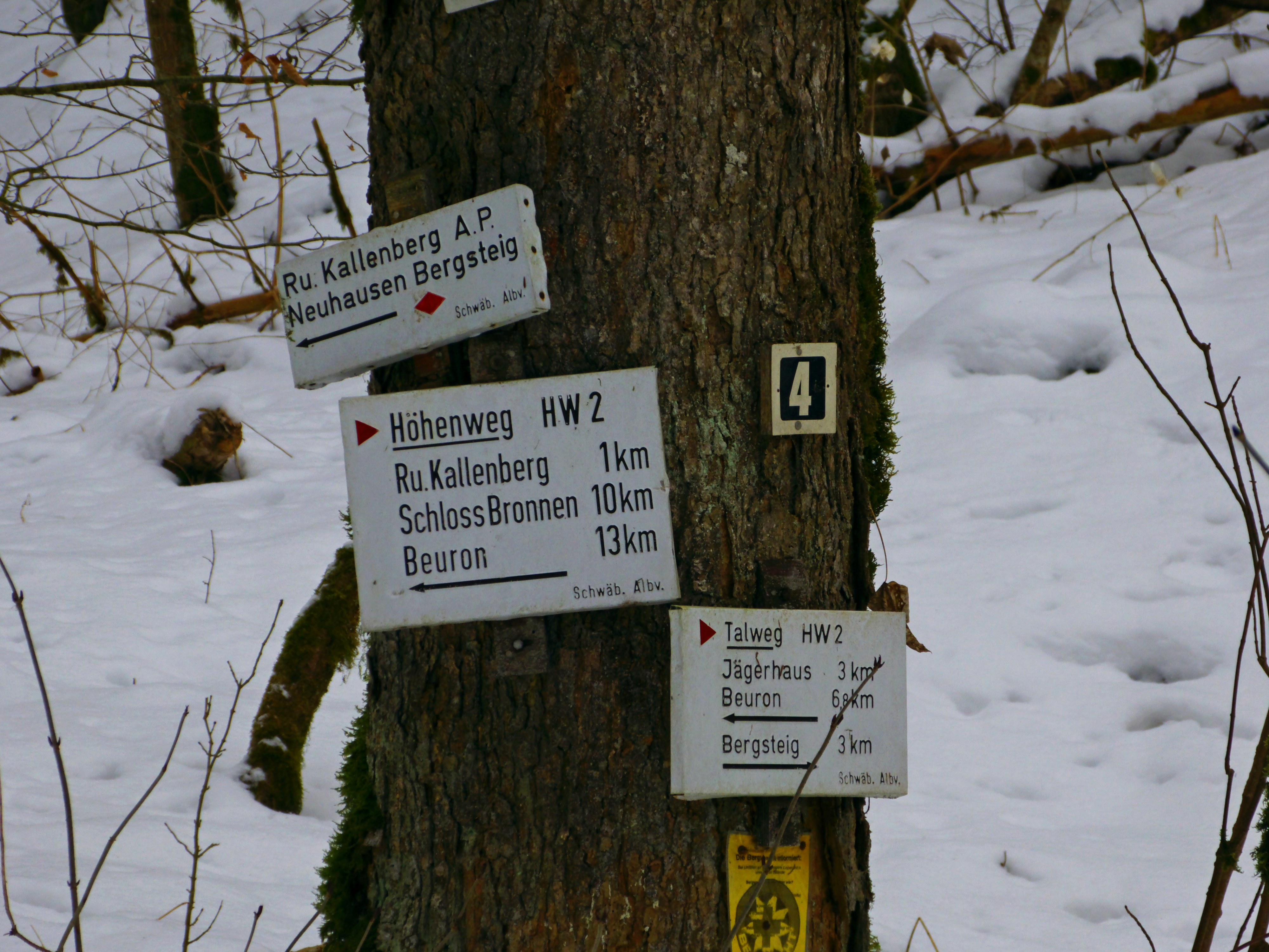 Options